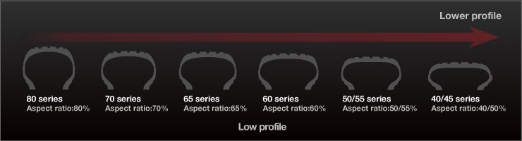 Na tomto obrázku můžeme vidět, jak se mění profil pneumatiky s klesající výškou bočnice.